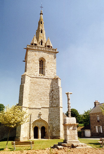 Description : Goudelin (22) - Chapelle Notre-Dame de l'Isle. Date : 1997 Auteur : Ifernyen Source : Archives personnelles, scan d'après tirage argentique Statut : GFDL Ifernyen